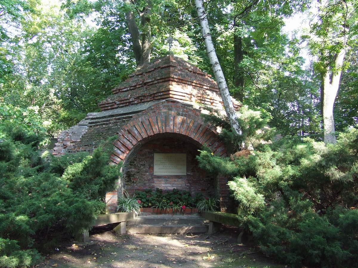 Świątynia Opatrzności Bożej, Ogród Botaniczny UW w Warszawie